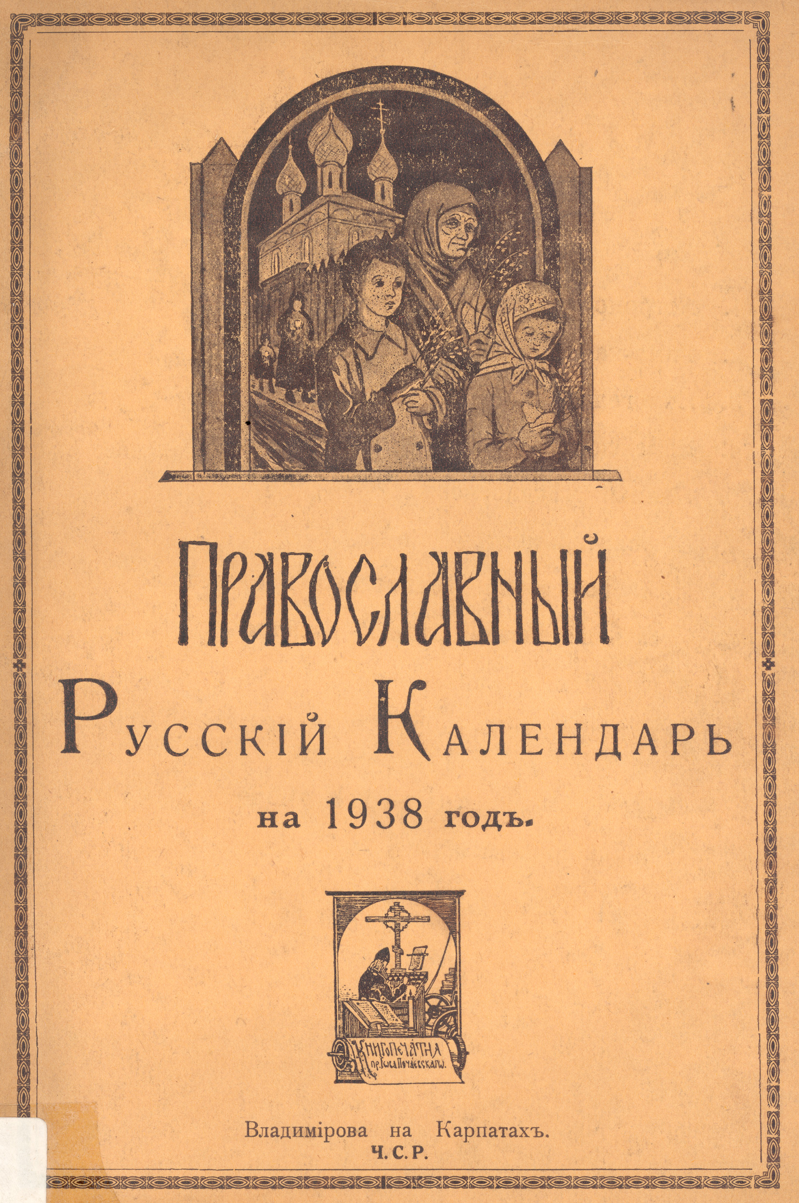 Образец печатной продукции Типографского братства пр. Иова во Владимировой